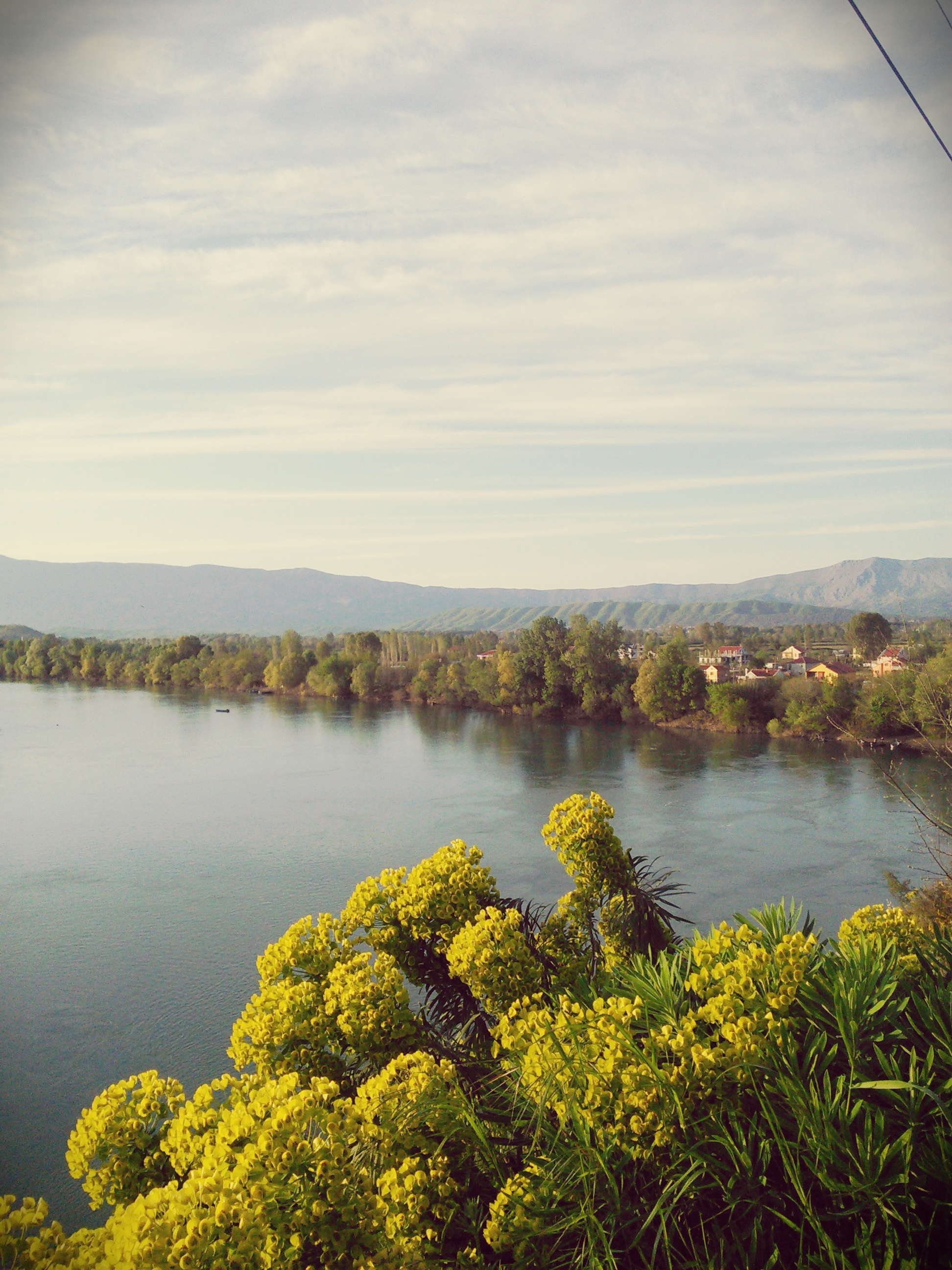 Liqeni Shkodres-Lumi Bunes, Shkoder